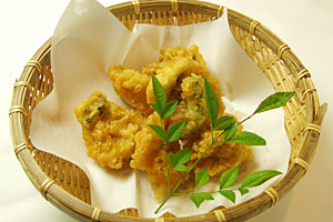 瀬戸内名物べえすけの天ぷら